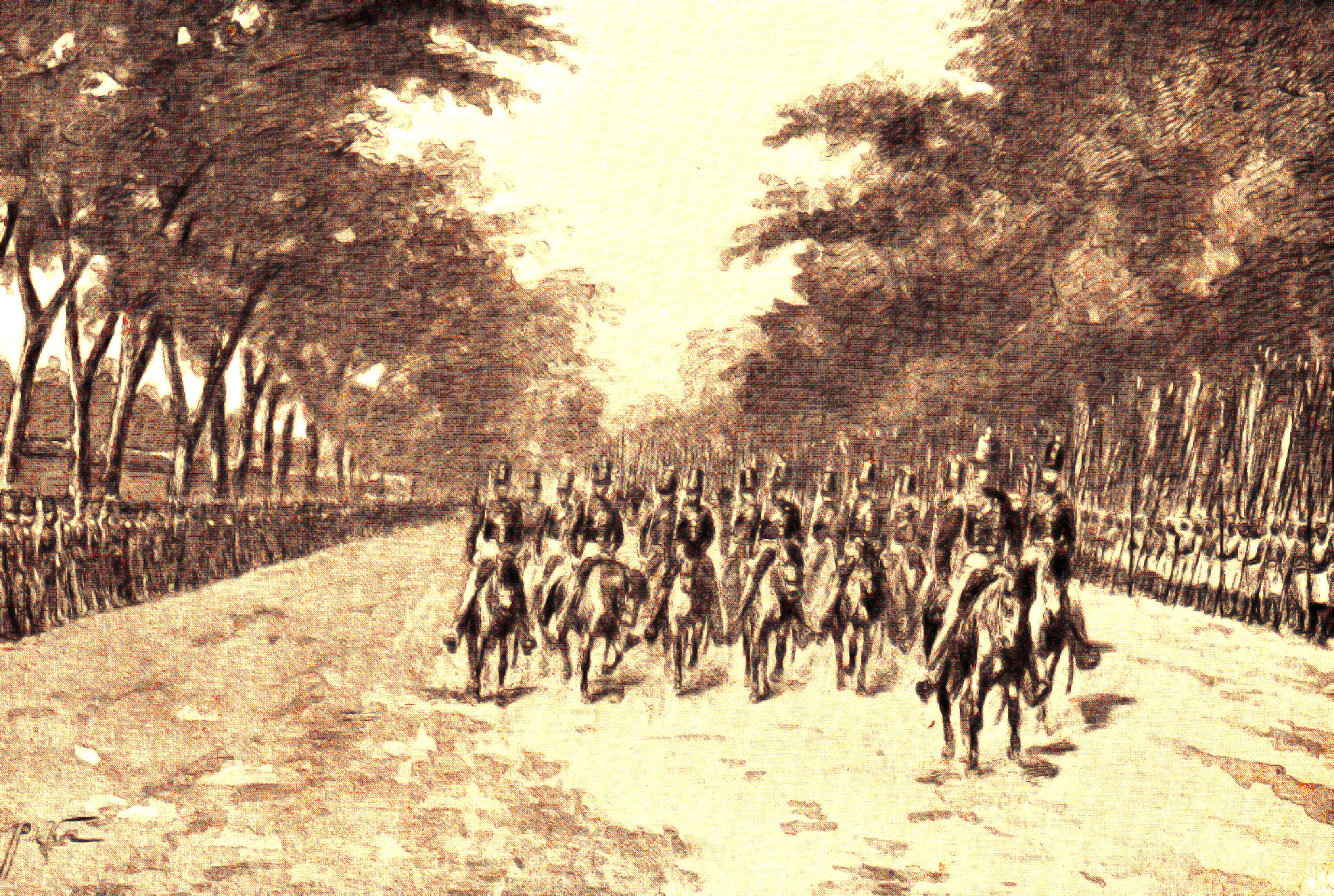 Intocht van de vorst van Karang Asam